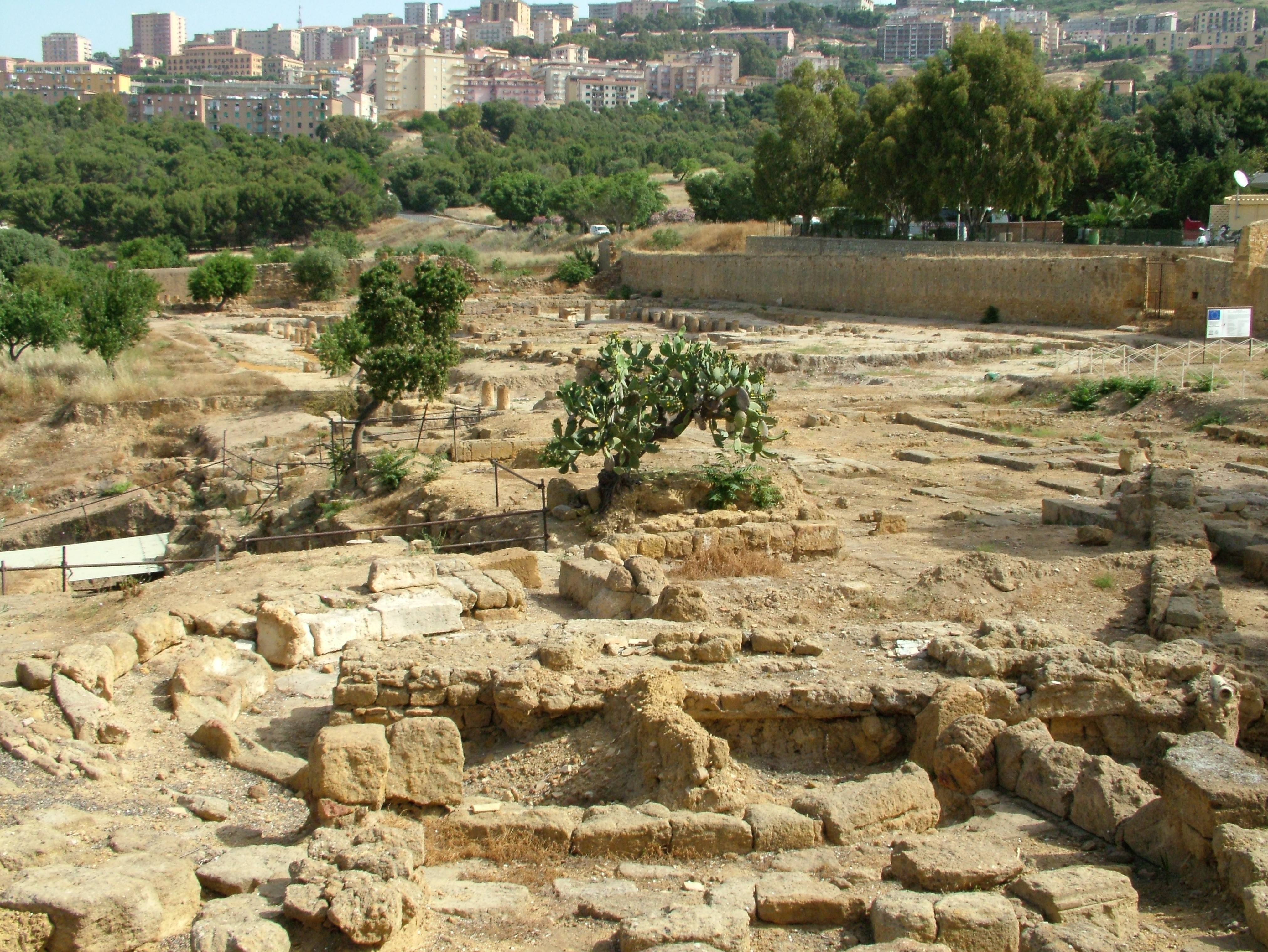 Agrigent, Sizilien, Archelogische Museum, Blick aus dem Museum auf die (vermutliche) hohe Agora